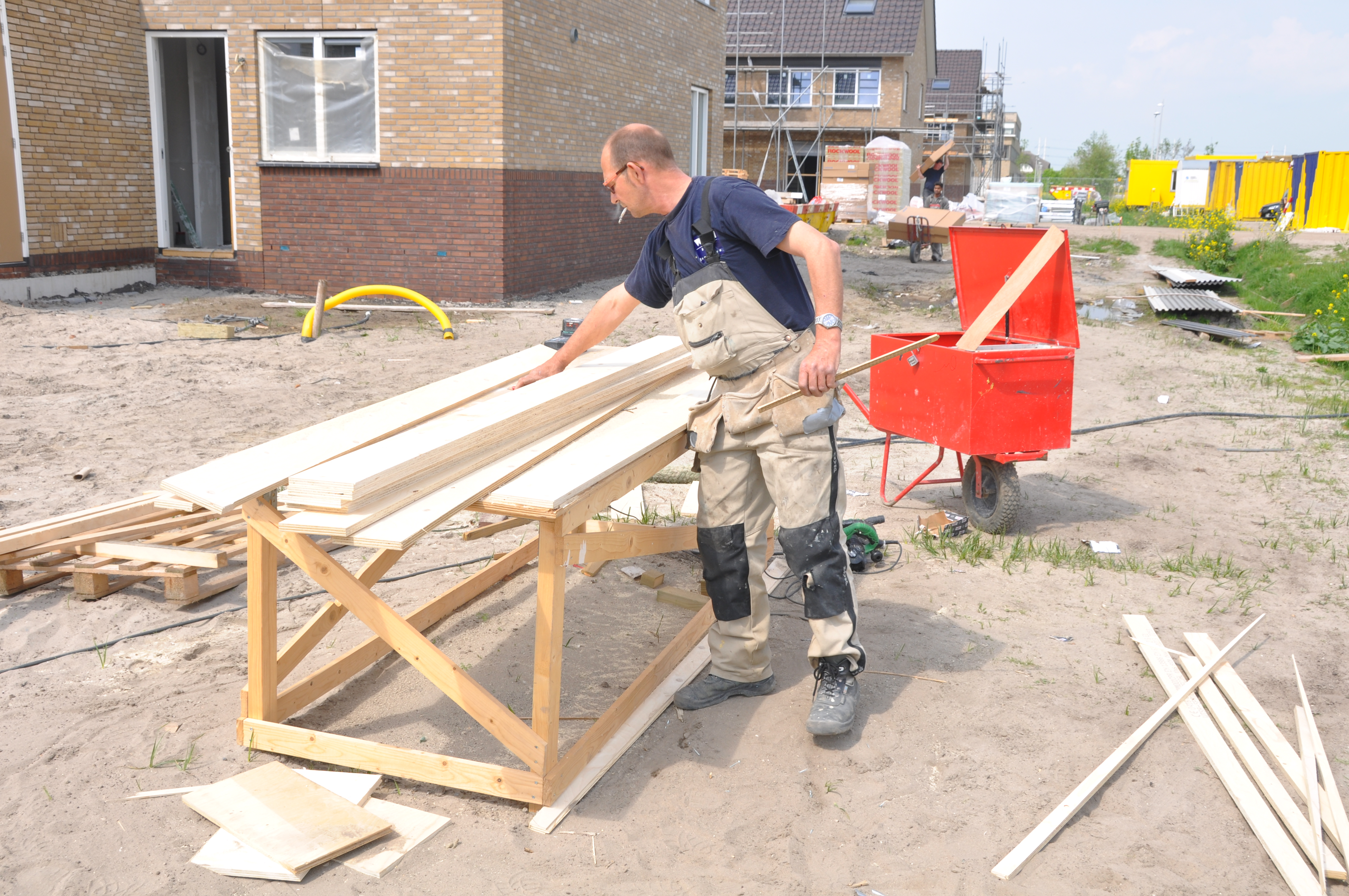 De Oosterscheldestraat (Berkel en Rodenrijs) status 28 april 2014.